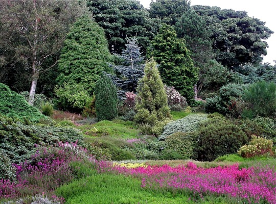 Heather Garden, Ness Gardens